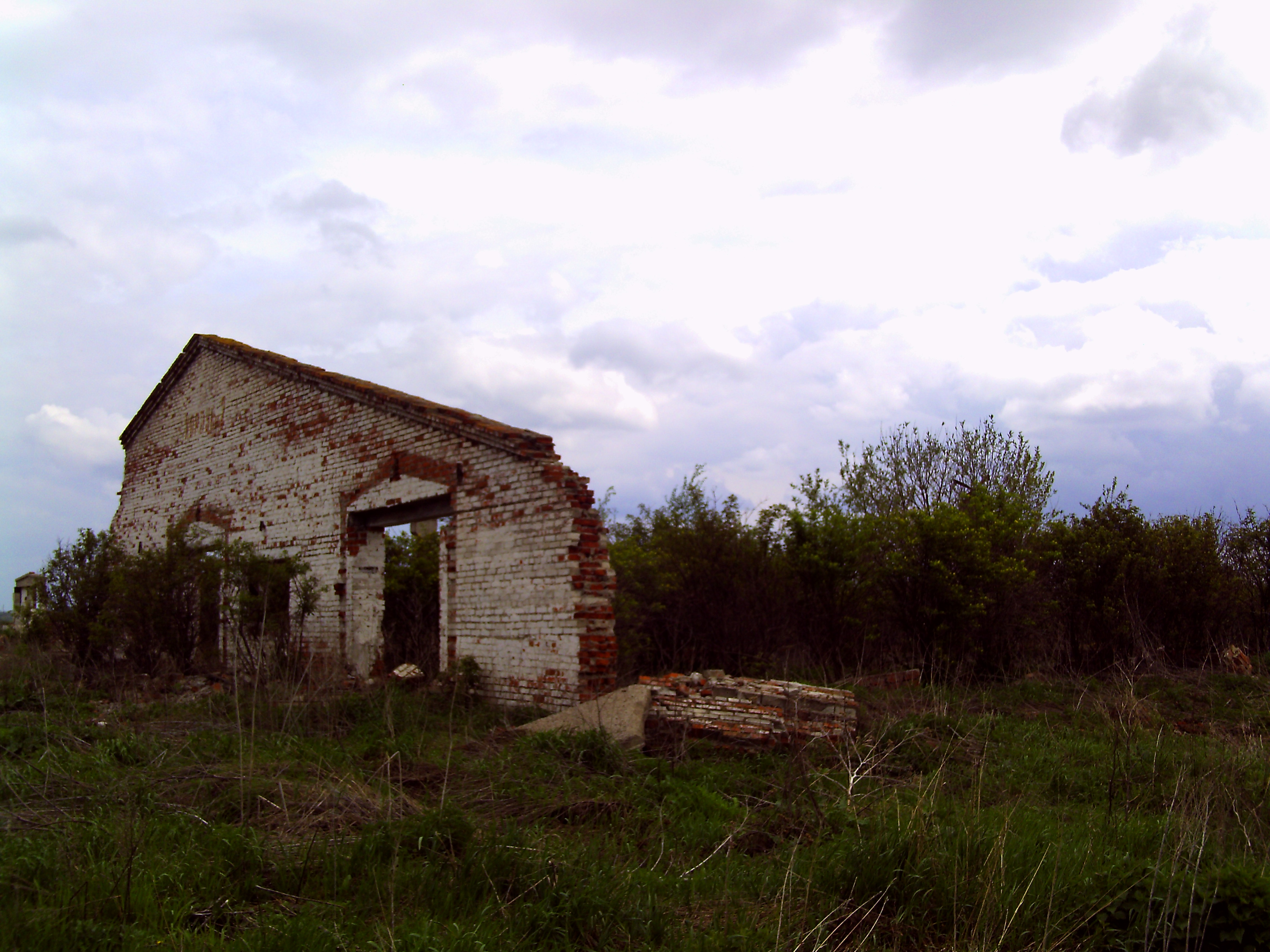 Коровник в Гагарино